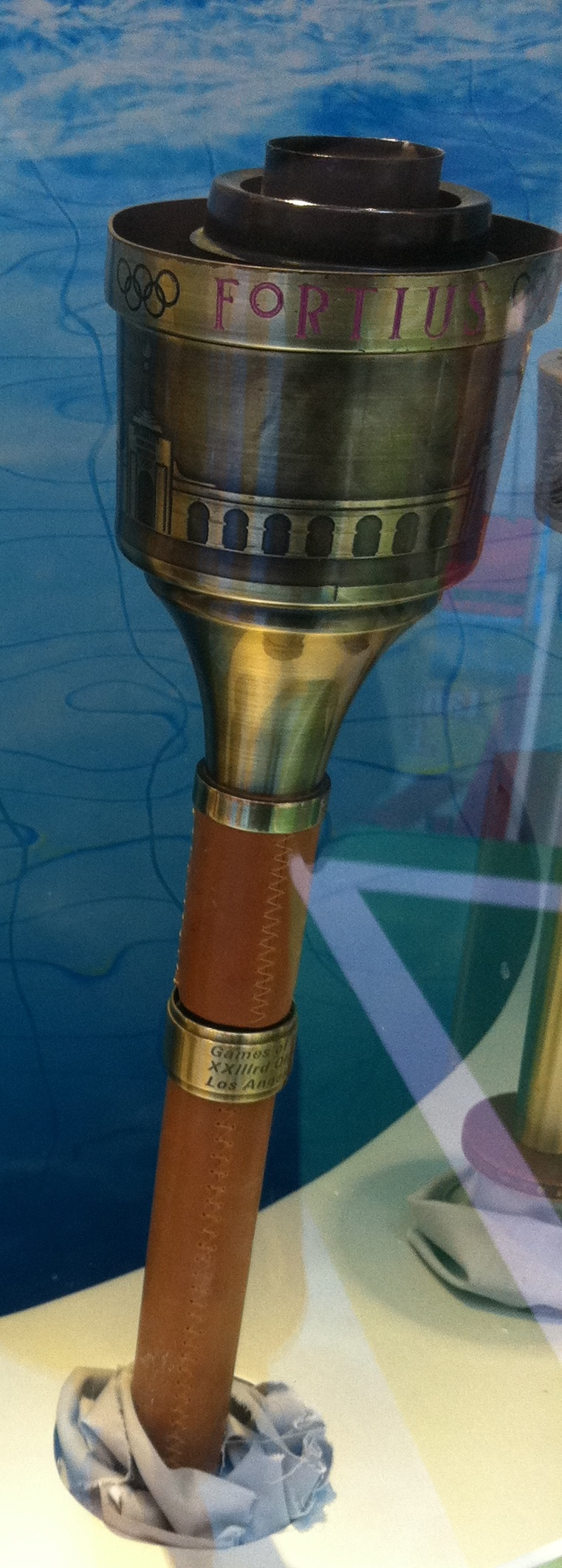 1984年夏季奧運火炬